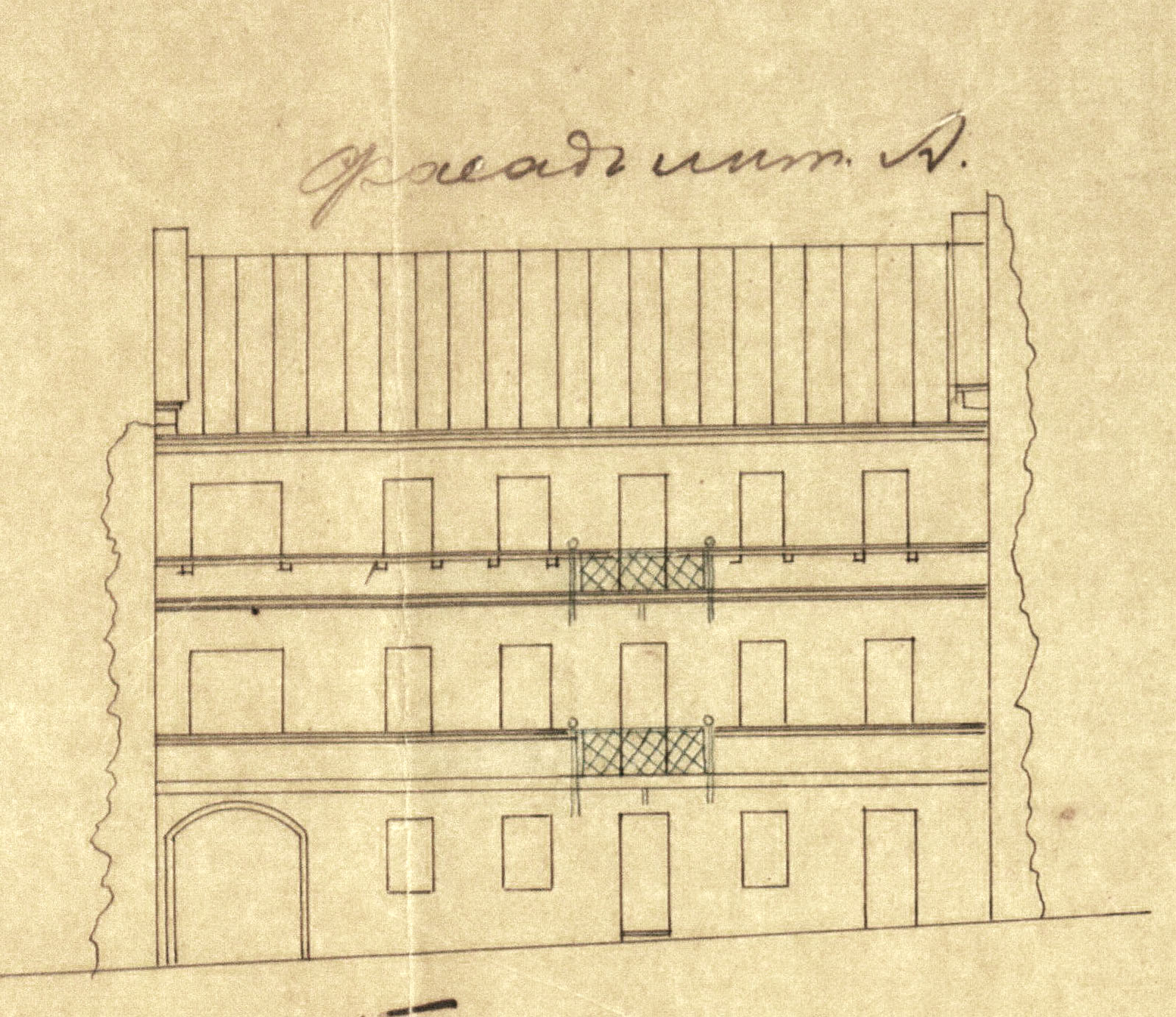 Беларуская (тарашкевіца): Менск (Miensk), вуліца Койданаўская (vulica Kojdanaŭskaja). Дом, якім на момант складаньня праекту валодаў Ш. Шульман